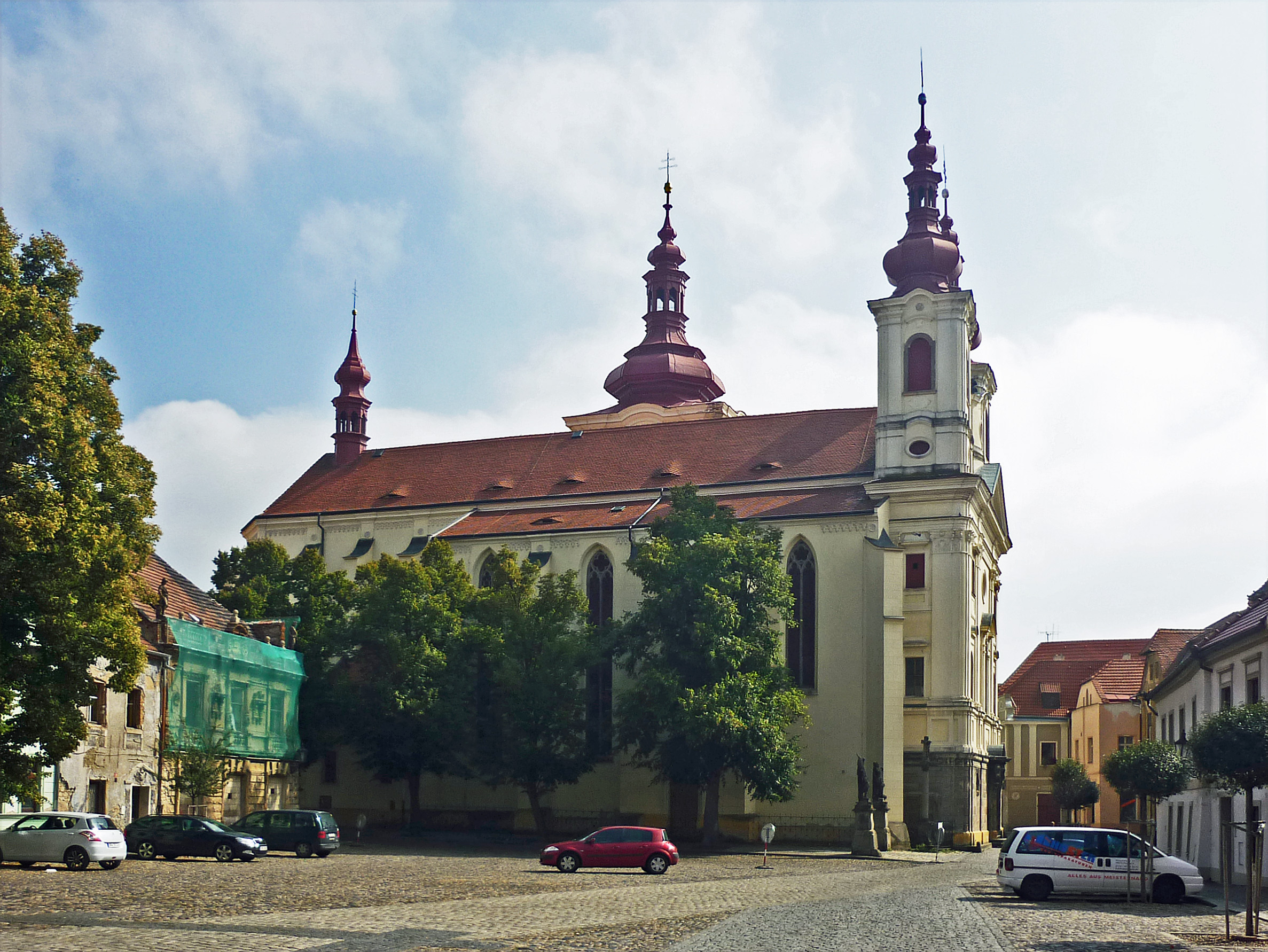 Saaz/Žatec, Dekanatskirche Mariä Himmelfahrt (Ansicht von Norden)